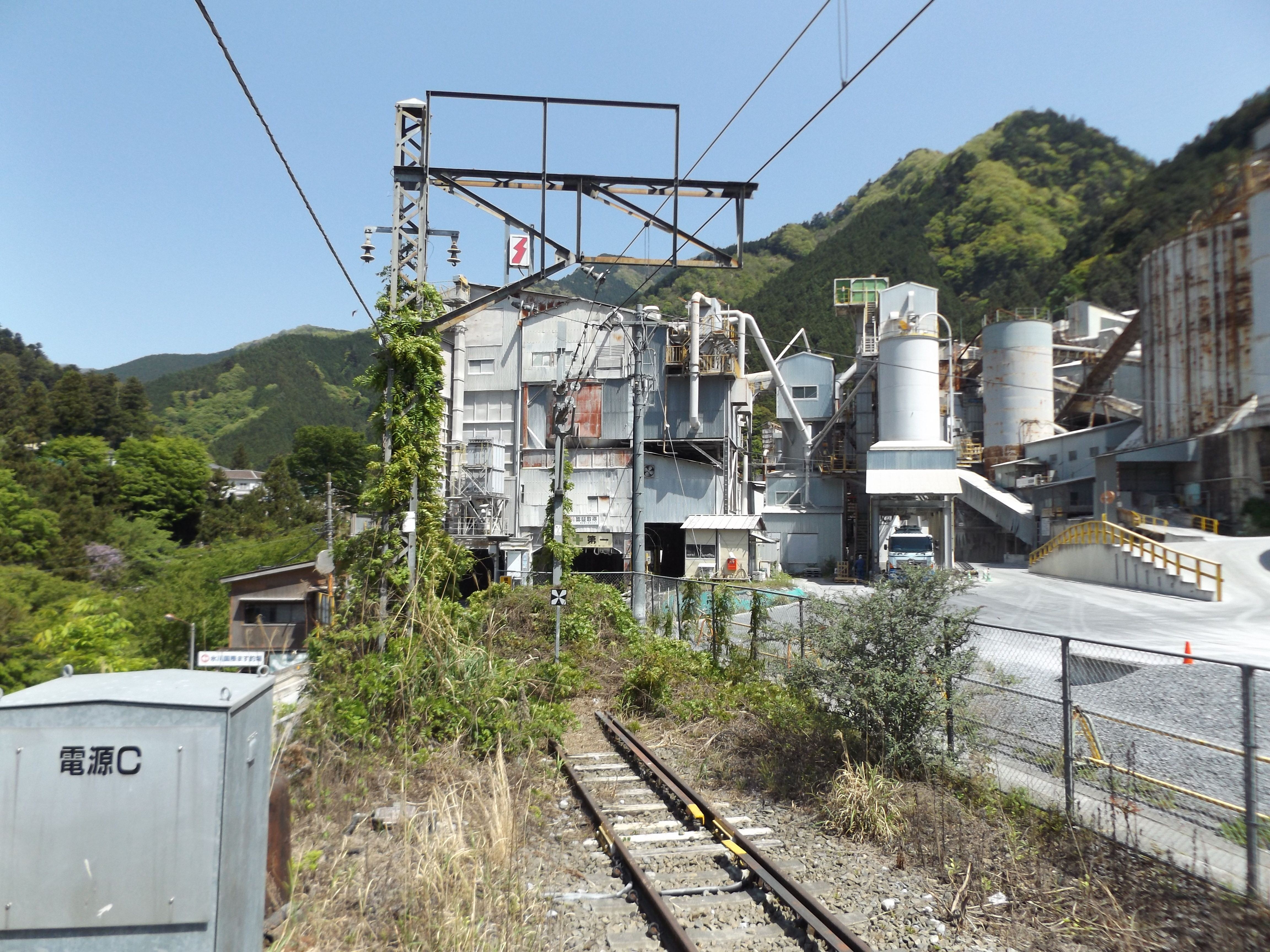 東京都西多摩郡奥多摩町にある東日本旅客鉄道（JR東日本）青梅線奥多摩駅2番線の線路終端部。